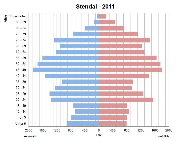 Bevölkerungspyramide der Stadt Stendal nach Zensus 2011.